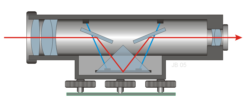 Prinzip eines Nivelliers mit automatischen Horizont, welcher durch ein Pendelprisma hergestellt wird. Das Prisma ist an Bändern (blau) aufgehängt. Das Prinzipbild ist bzgl. der optischen Abbildungseigenschaften nicht getreu. Grafik Joachim Baecker 2005